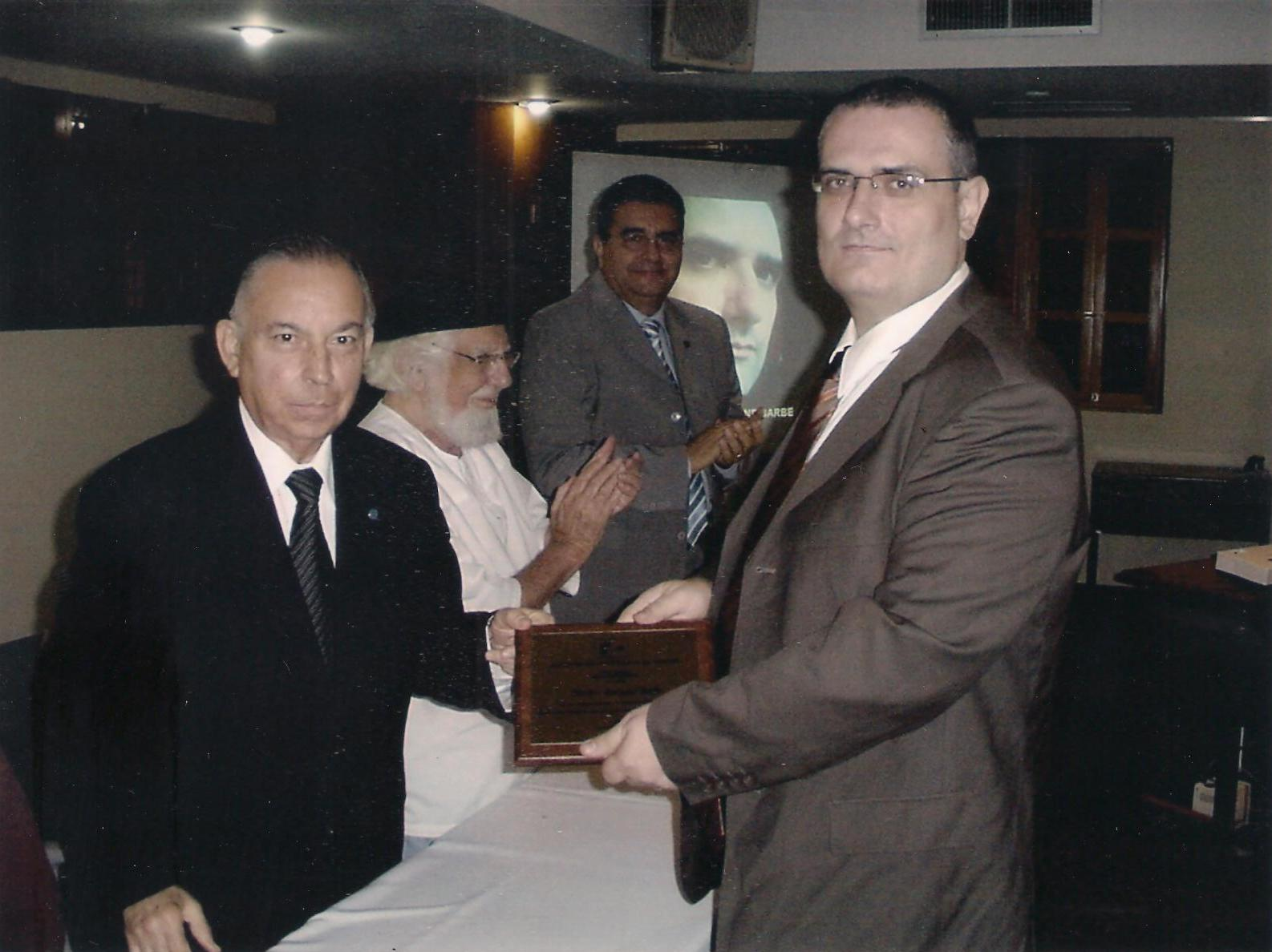 L'historien d'art et artiste français Norbert Bertrand Barbe lors d'une réception en son honneur en janvier 2009 à l'université américaine de Managua. De gauche à droite : le Dr Carlos Tunnermann-Bernheim, président du Centre nicaraguayen d'écrivains (CNE) et Norbert-Bertrand Barbe. À l'arrière plan (en blanc) : le poète Padre Ernesto Cardenal, président honorifique du CNE.